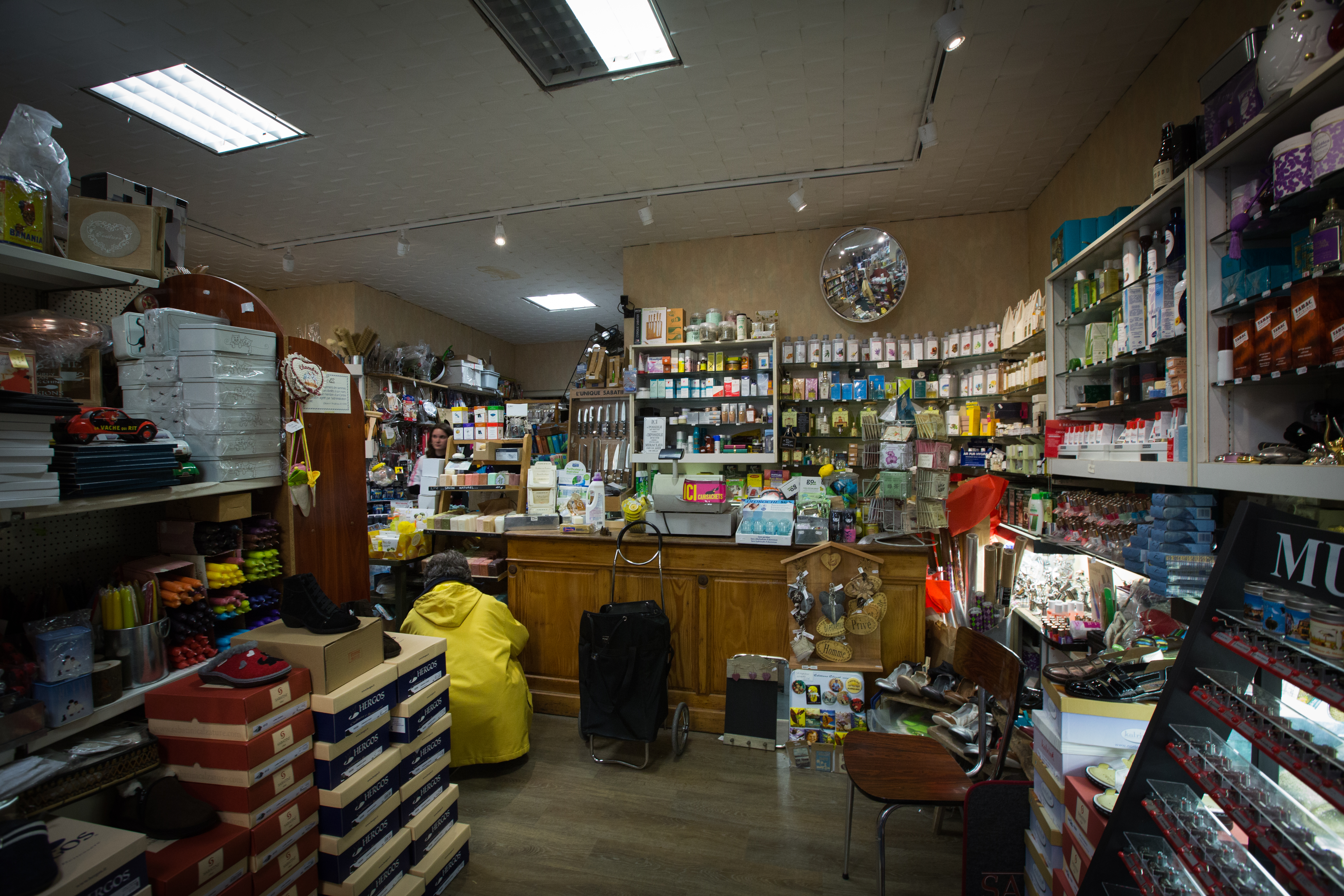 Strasbourg 24 Grand Rue intérieur droguerie du Cygne